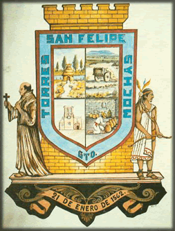 Escudo del municipio de San Felipe, Guanajuato.